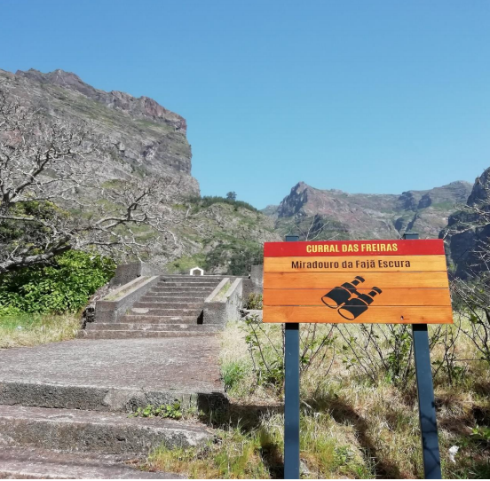 Faja escura miradouro